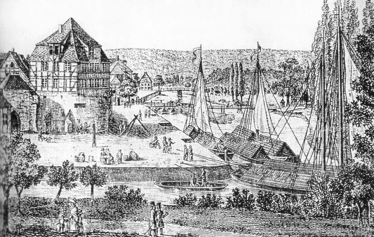 Schlagdspitze und Altes Sydekum in Münden mit Wanfrieder Schlagd und Bremer Schlagd, in der Fortsetzung dahinter ab der Brücke die Kasseler Schlagd, im Vordergrund der Doktorwerder